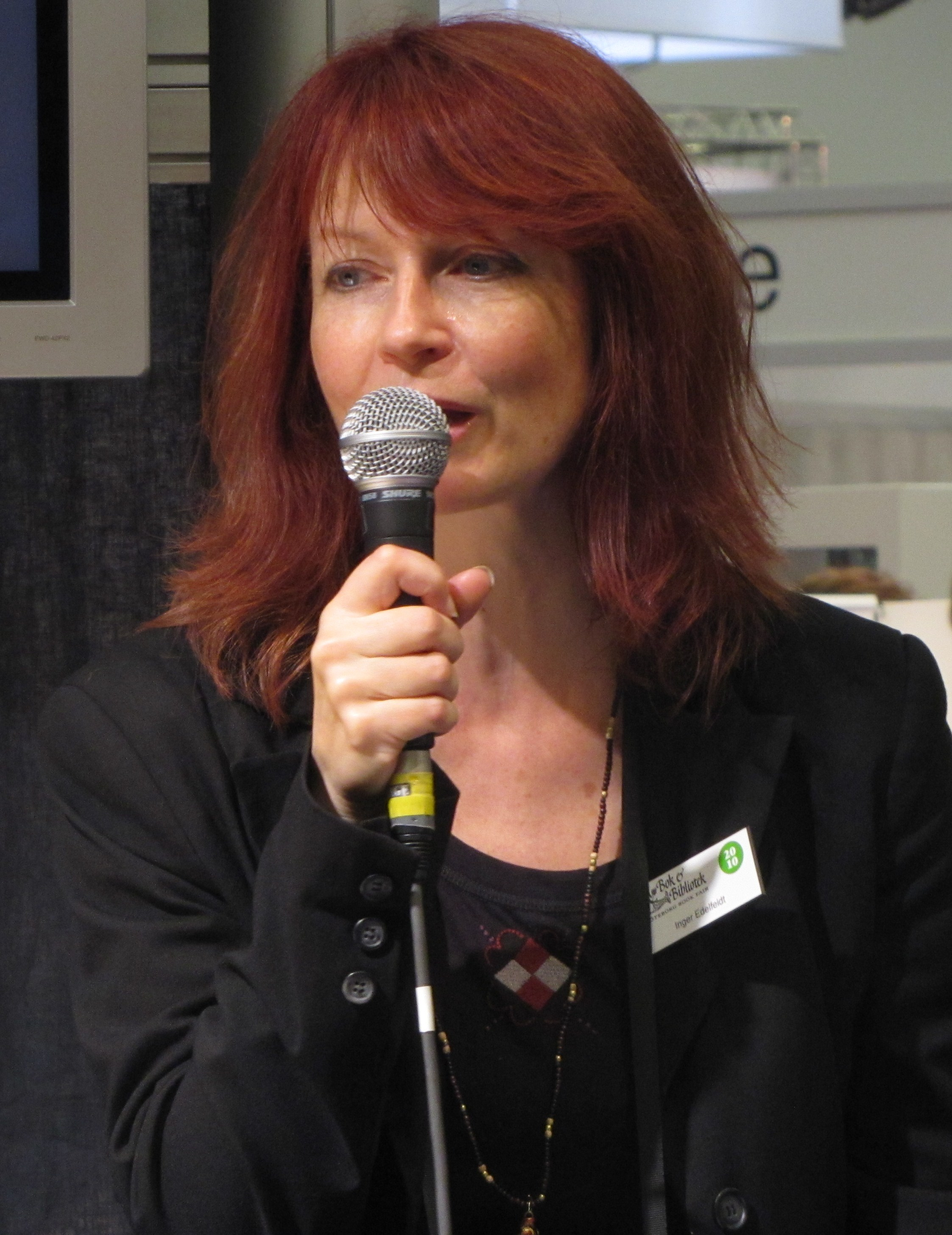 Inger Edelfeldt, författarinna och illustratör.